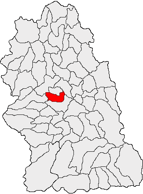 Categorie:Hărţi ale judeţului Hunedoara